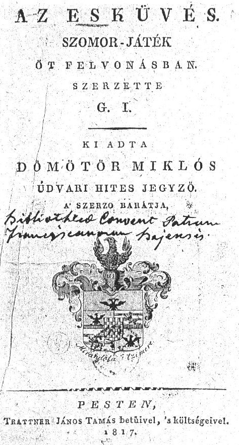 Gombos Imre drámájának címlapja.